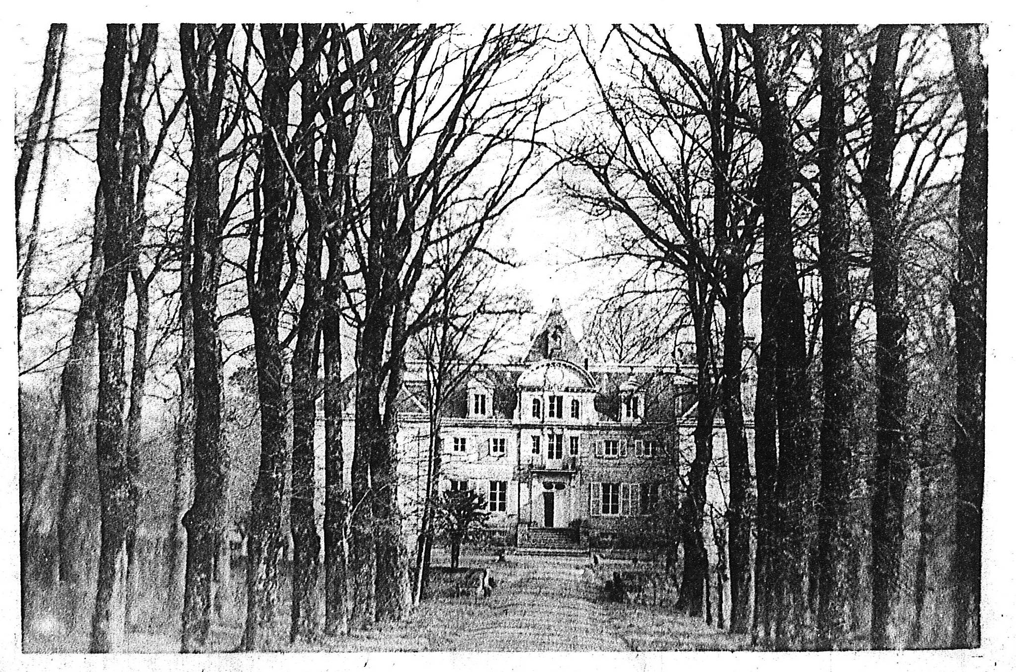 fonds Reims des personnalités. le chateau de léon Morillot.